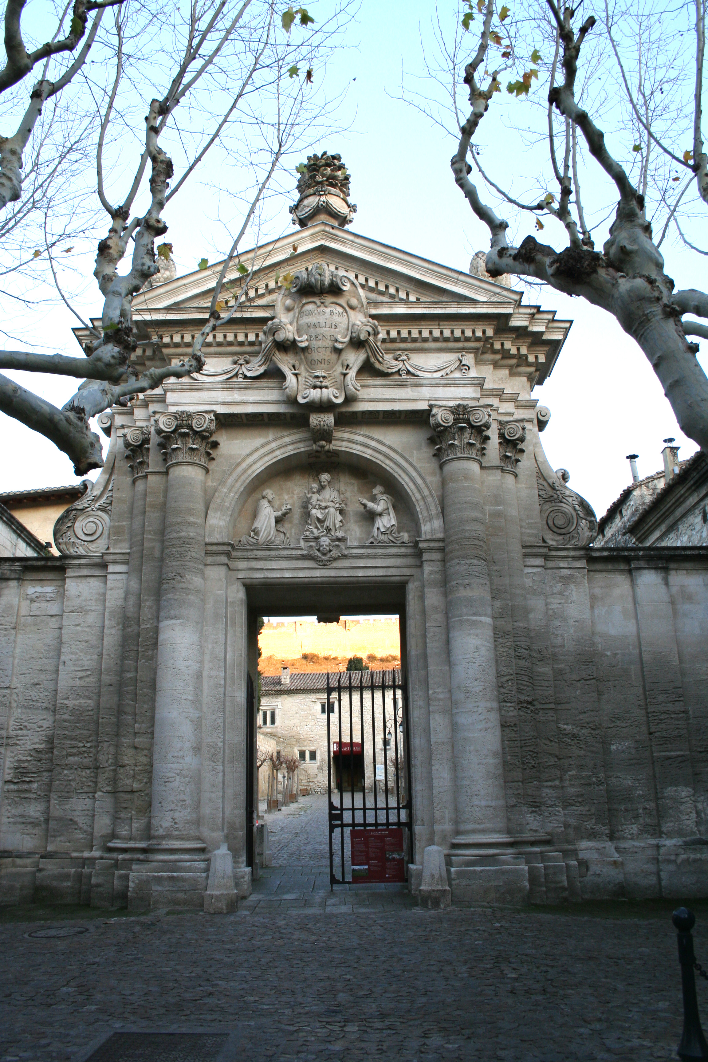 Porte monumentale de la chartreuse de Villeneuve-lès-Avignon, réalisée par François de Royers de la Valfenière et sculpté par Barthélemy Grangier (1648-1649).